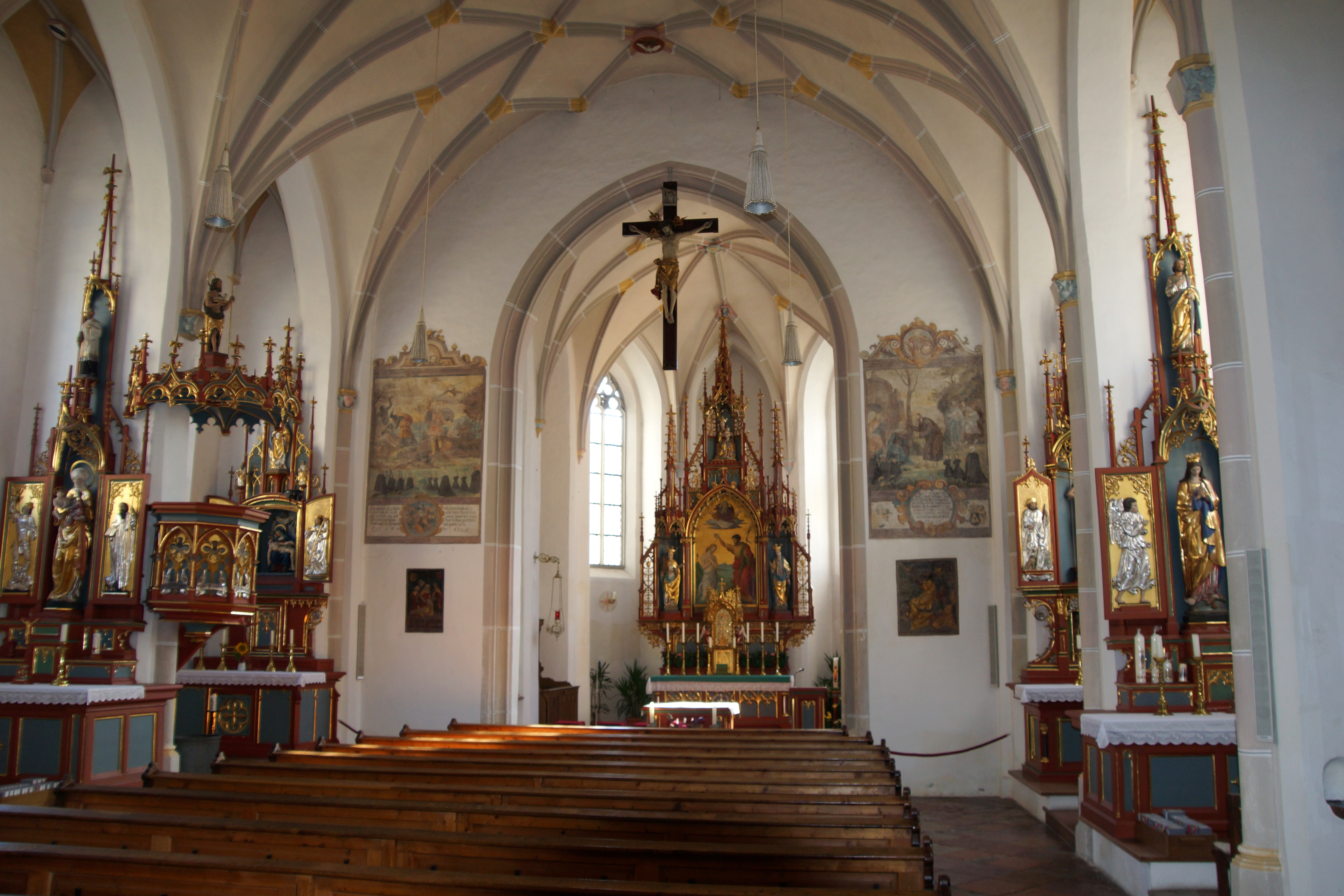 Die katholische Filial- und Marktkirche St. Johann Baptist im Oberbayerischen Neumarkt St. Veit